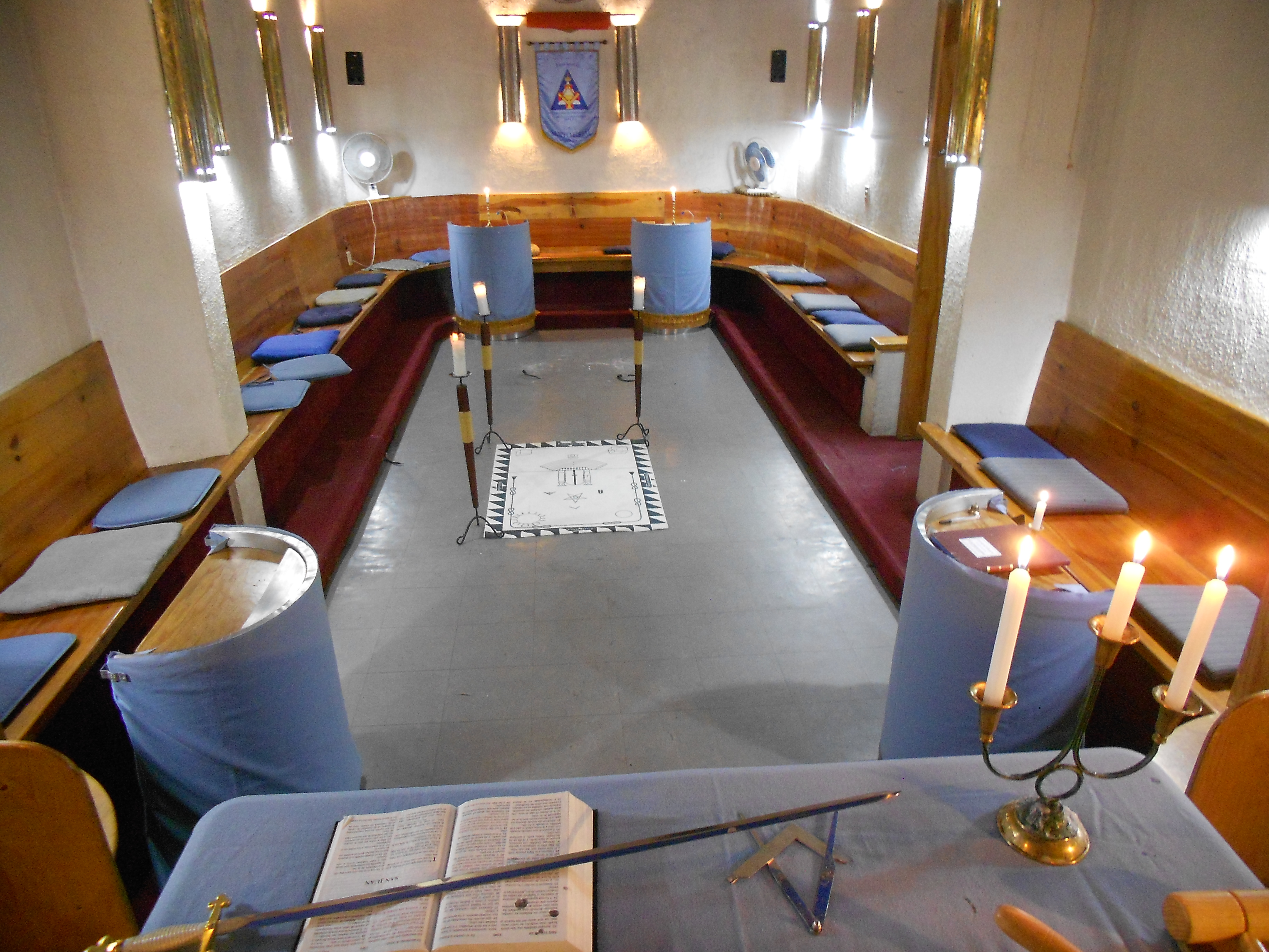 Templo masónico del Rito Escocés Rectificado en la Ciudad de México. Vista desde Oriente